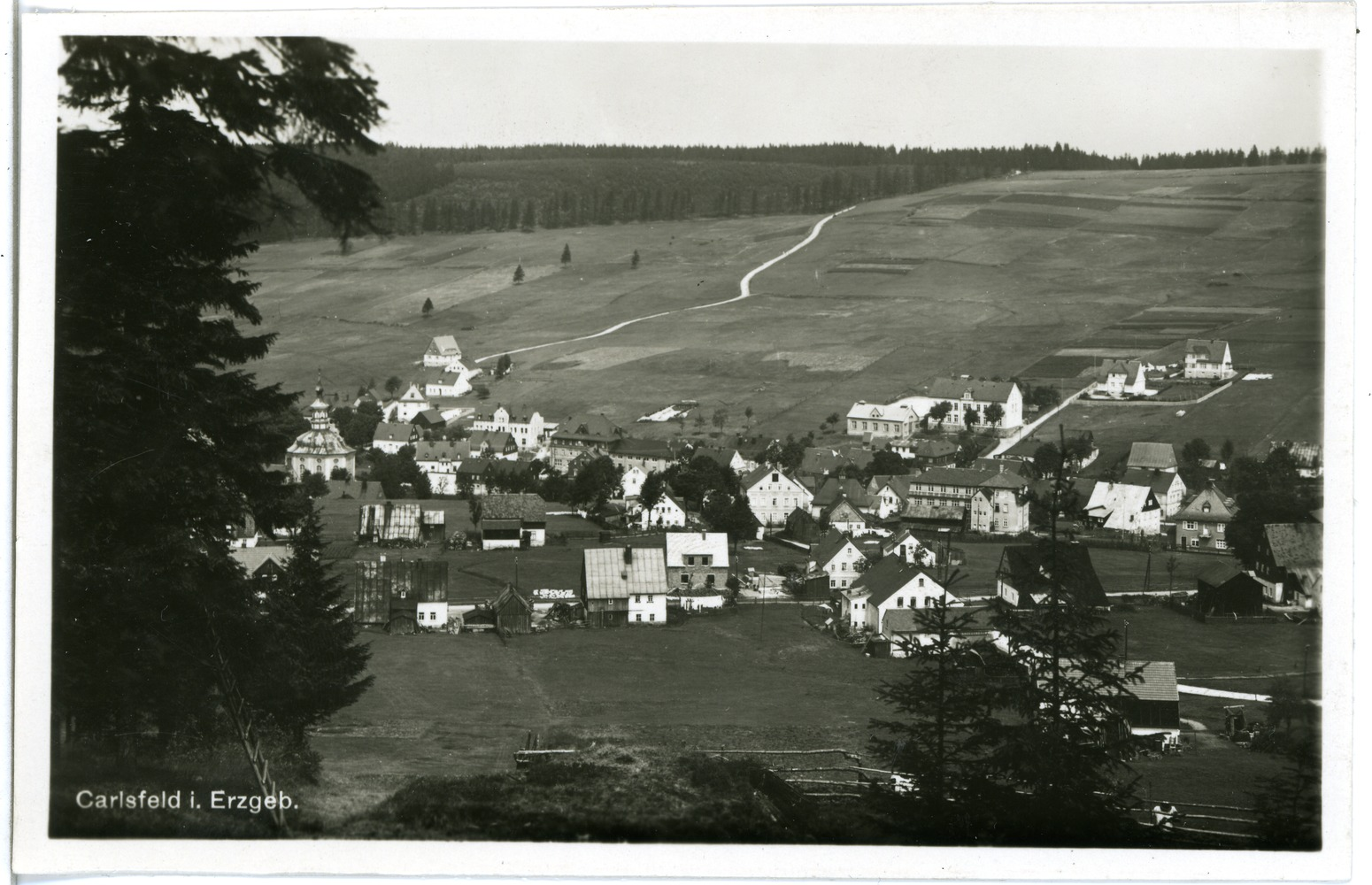 Carlsfeld; Blick auf Carlsfeld This postcard is from publisher Brück & Sohn in Meißen ( postcard has a unique number 25246 and is available in a higher resolution at the publisher. This images was uploaded in a cooperation project between Wikipedians and the publisher.